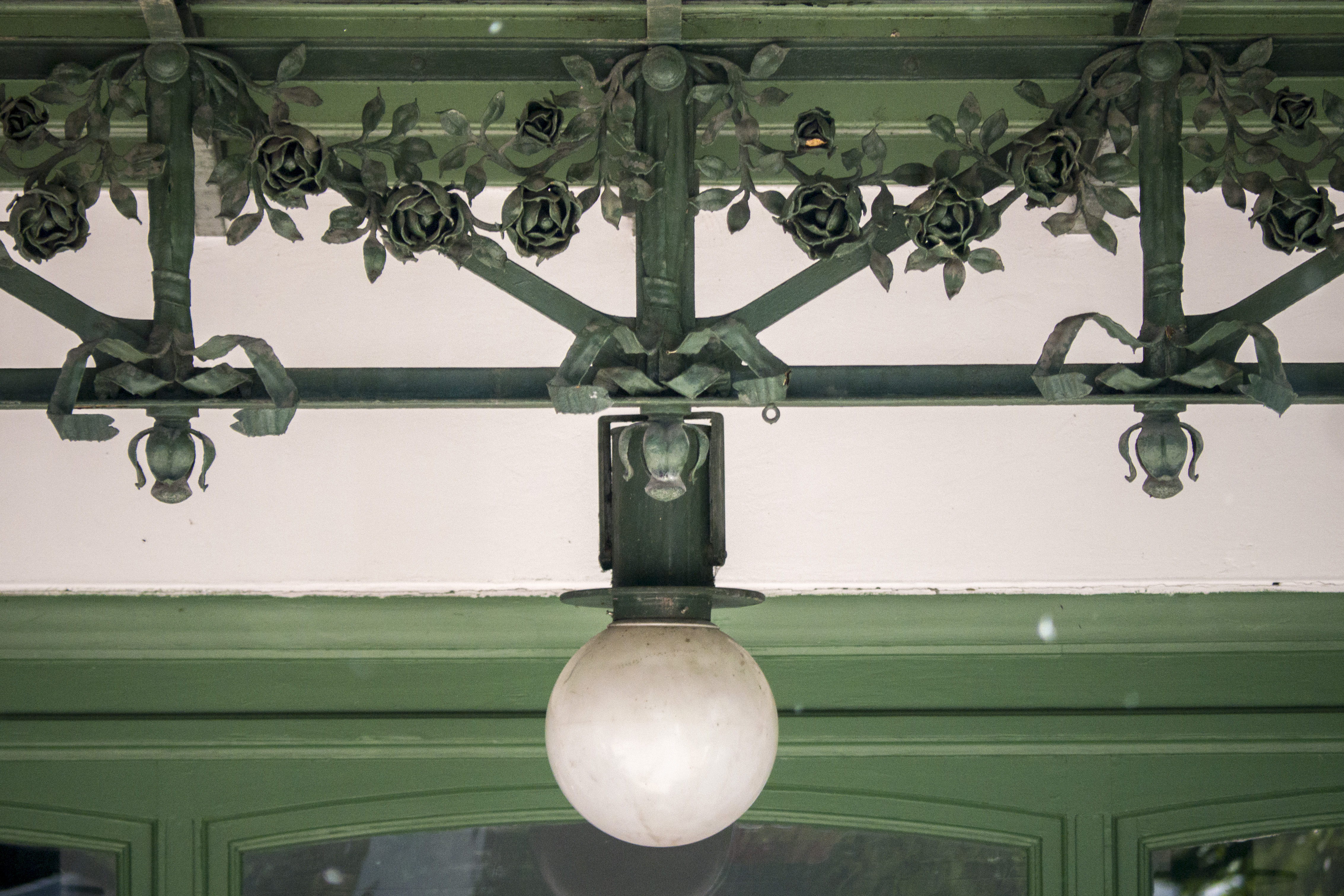 Ubahn Roßauer Lände Rosen